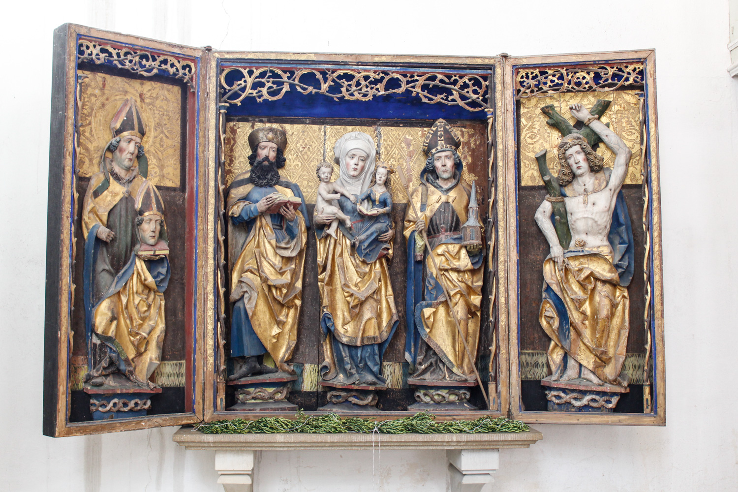 Kirche in Kayna, Zeitz, Burgenlandkreis, Sachsen-Anhalt, Deutschland